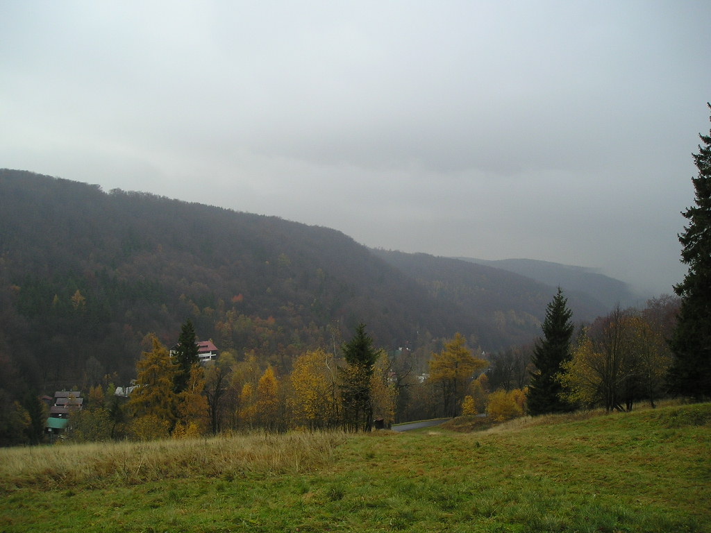 Zadní Telnice ze serpentin mířících do Adolfova.